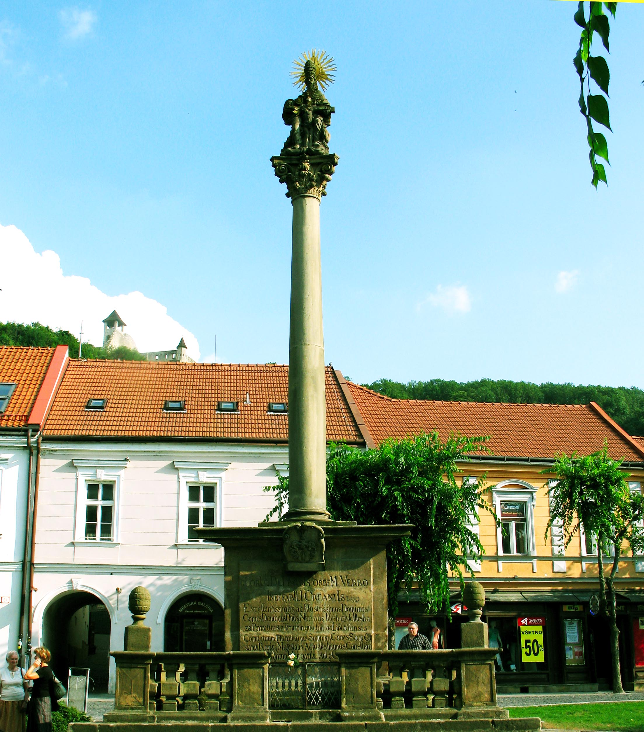 Morový pamätník, ako stĺp s plastikou vo vrchole zasvätených sv. Trojici (z roku 1712), na Mierovom námesti v Trenčíne